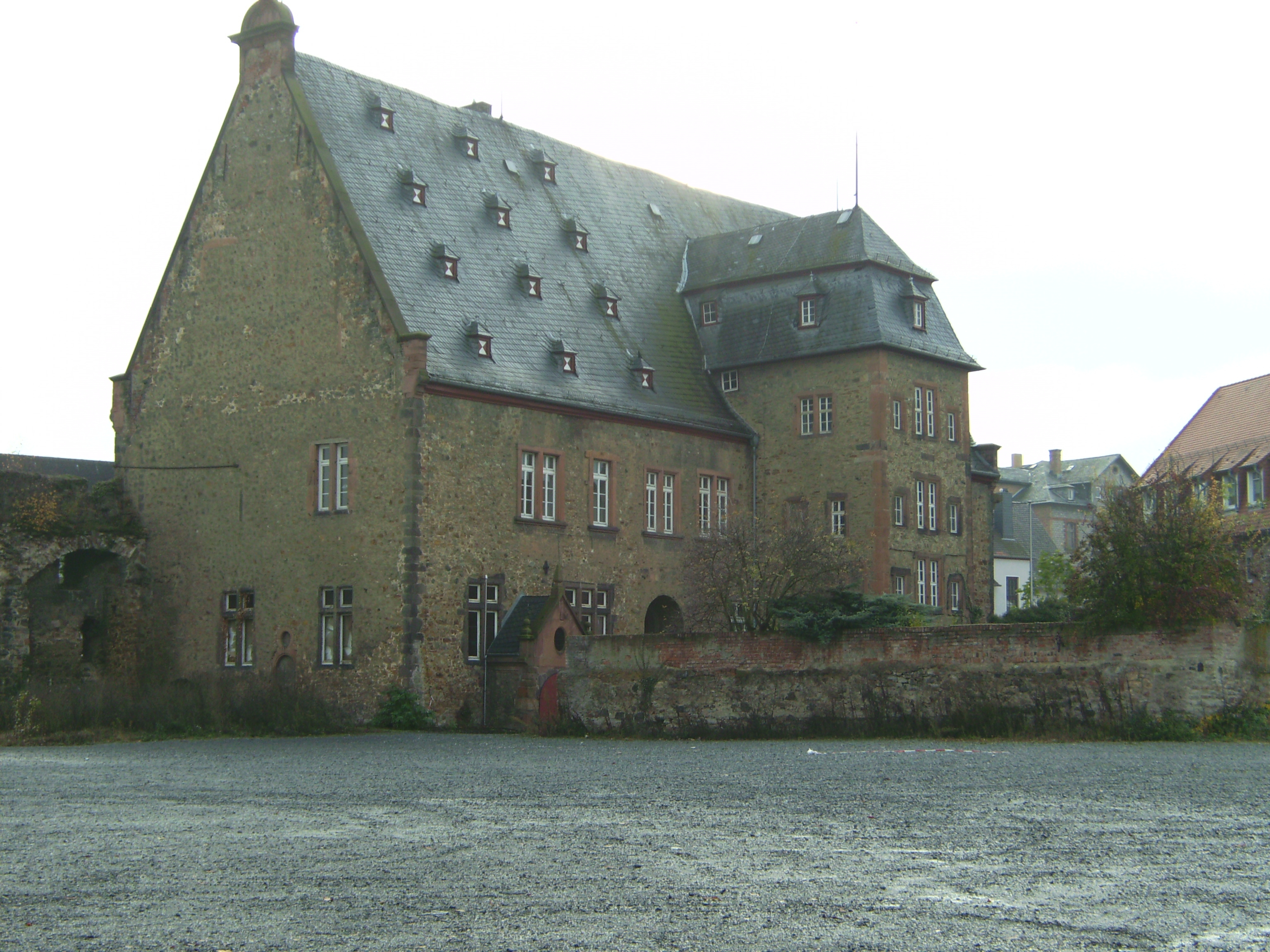 Das Solmser Schloss (auch Solmssches Schloss) ist eine Schlossanlage der Grafen von Solms-Lich in Butzbach, Wetteraukreis in Hessen, eines der beiden Schlösser von Butzbach